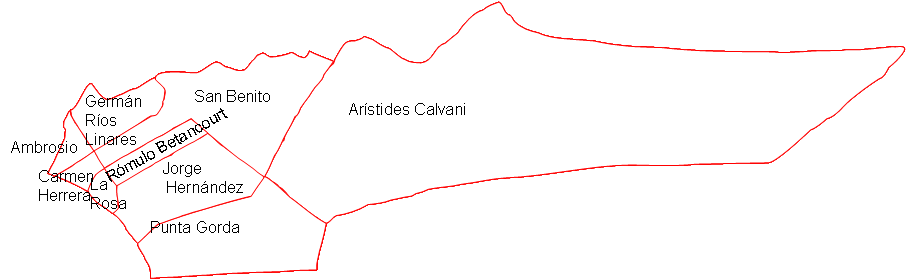 Parroquias del Municipio Cabimas, estado Zulia, Venezuela